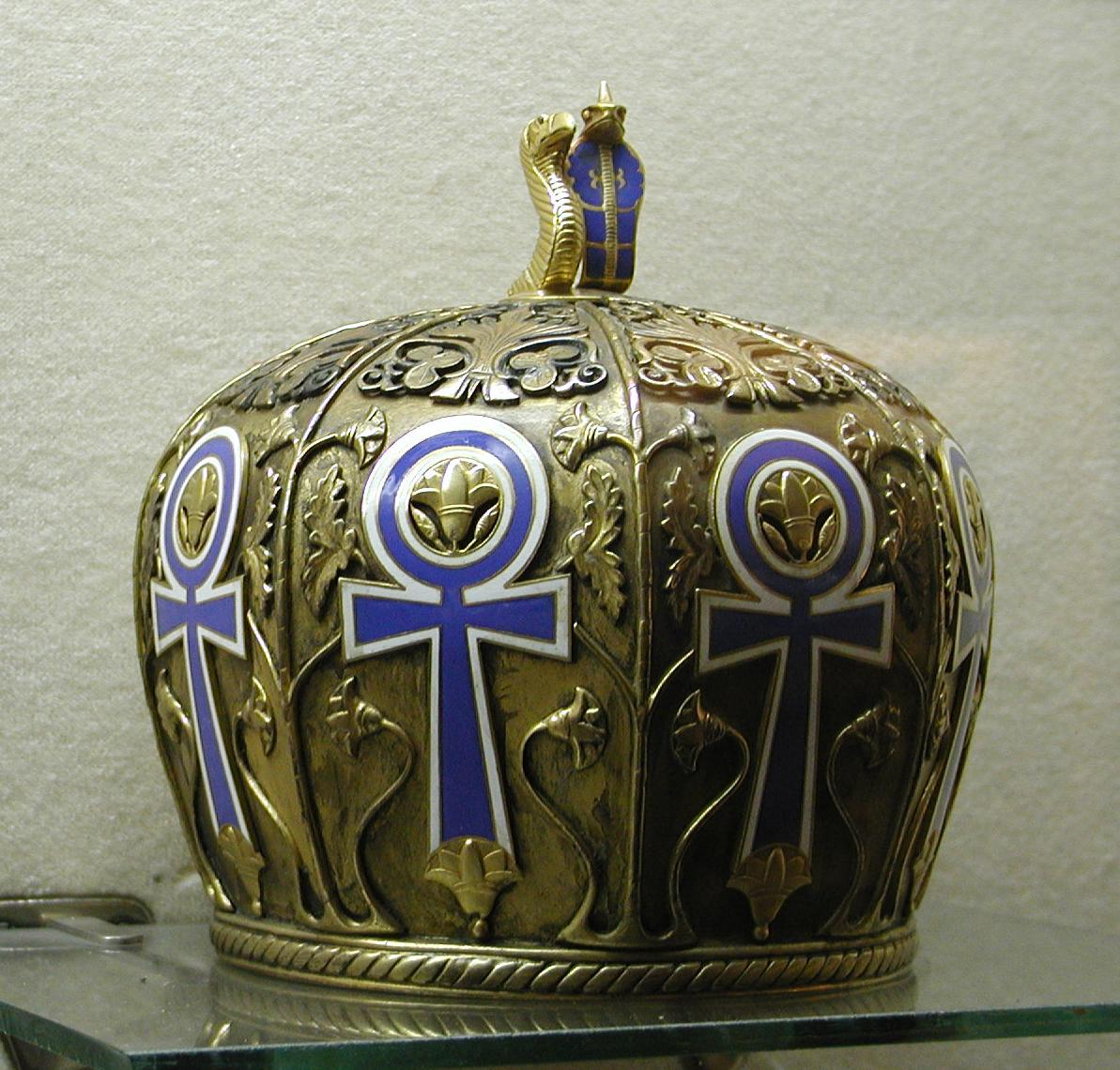 Couronne pharaonique au Musée du Palais d'Abedin, Le Caire, Égypte.